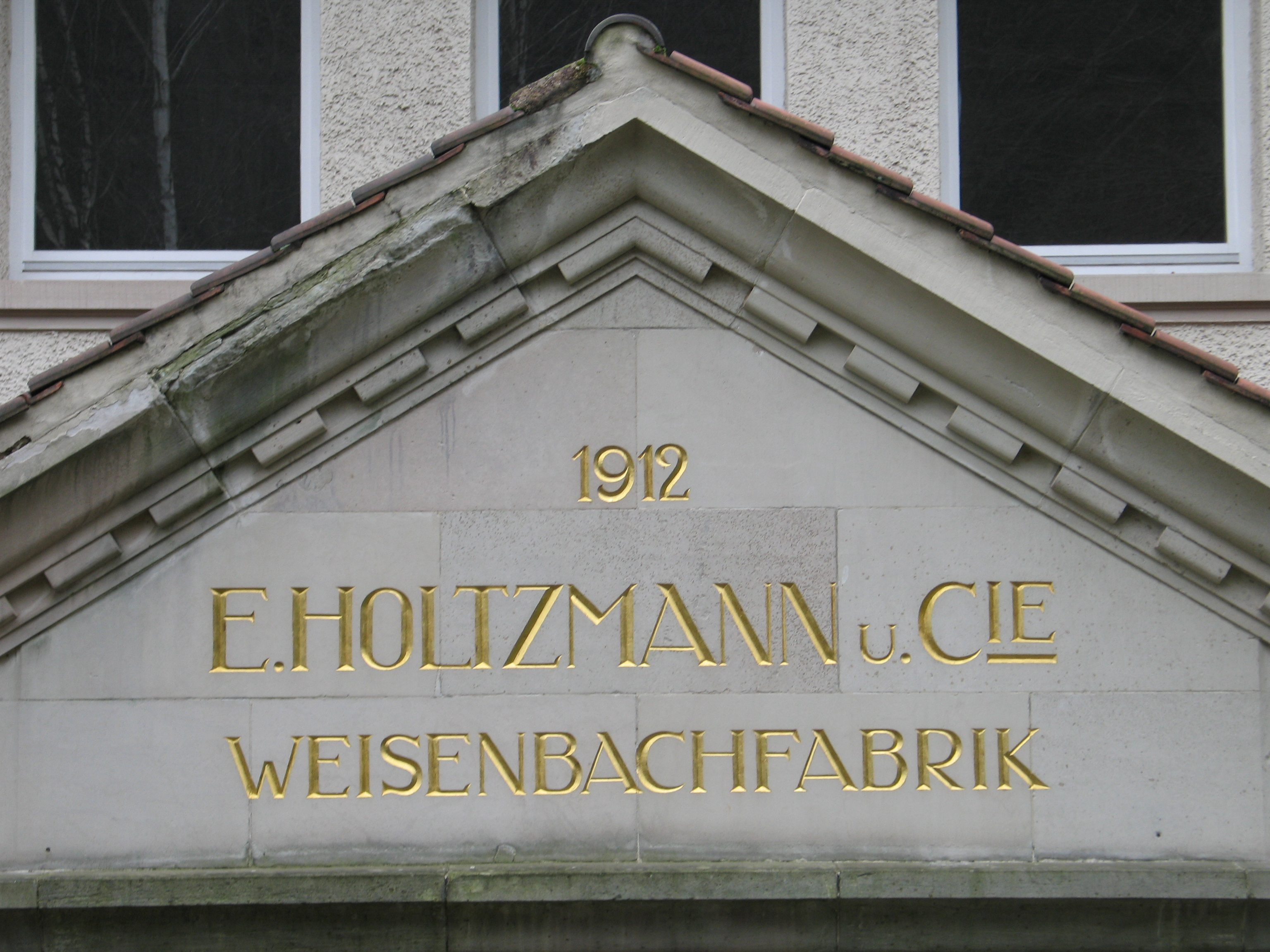 Firmengravur des ehemaligen Papierherstellers E. Holtzmann & Cie. AG über dem Haupteingang der ehemaligen Hauptverwaltung. Fotografiert von Der Bruzzla am 5. Dezember 2006